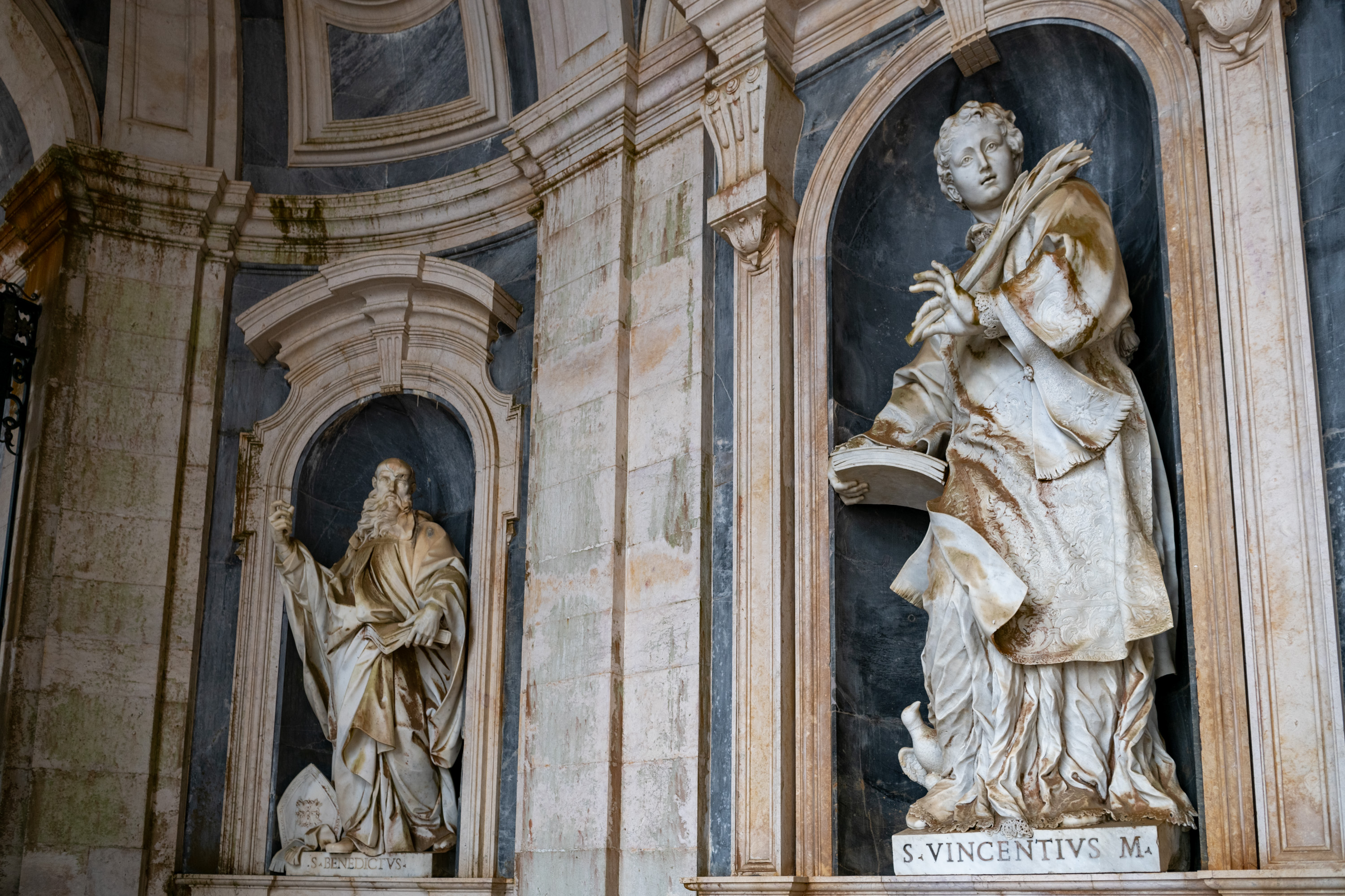 22403-Mafra